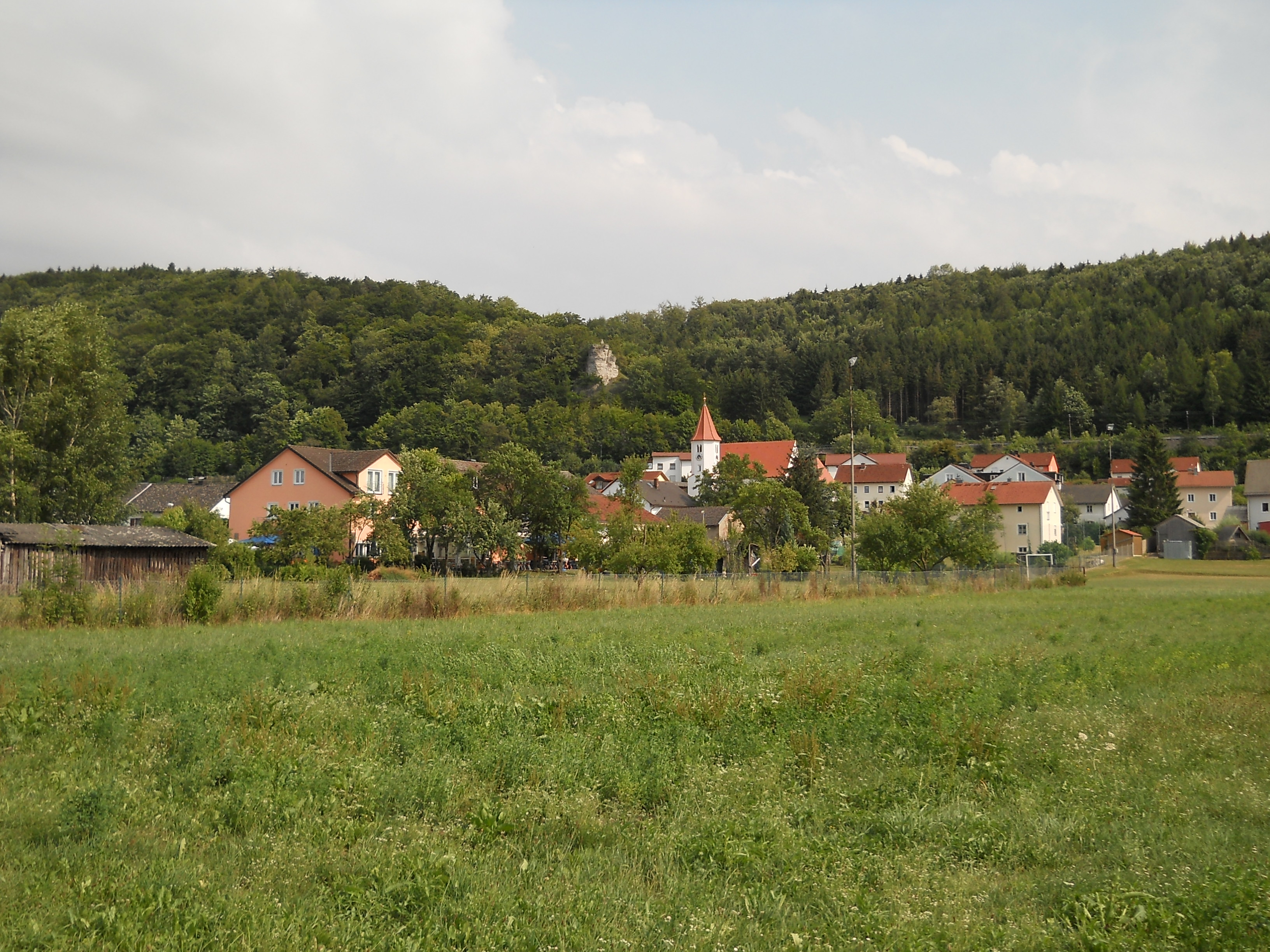 Wasserzell, Ortsteil von Eichstätt im Landkreis Eichstätt, Oberbayern